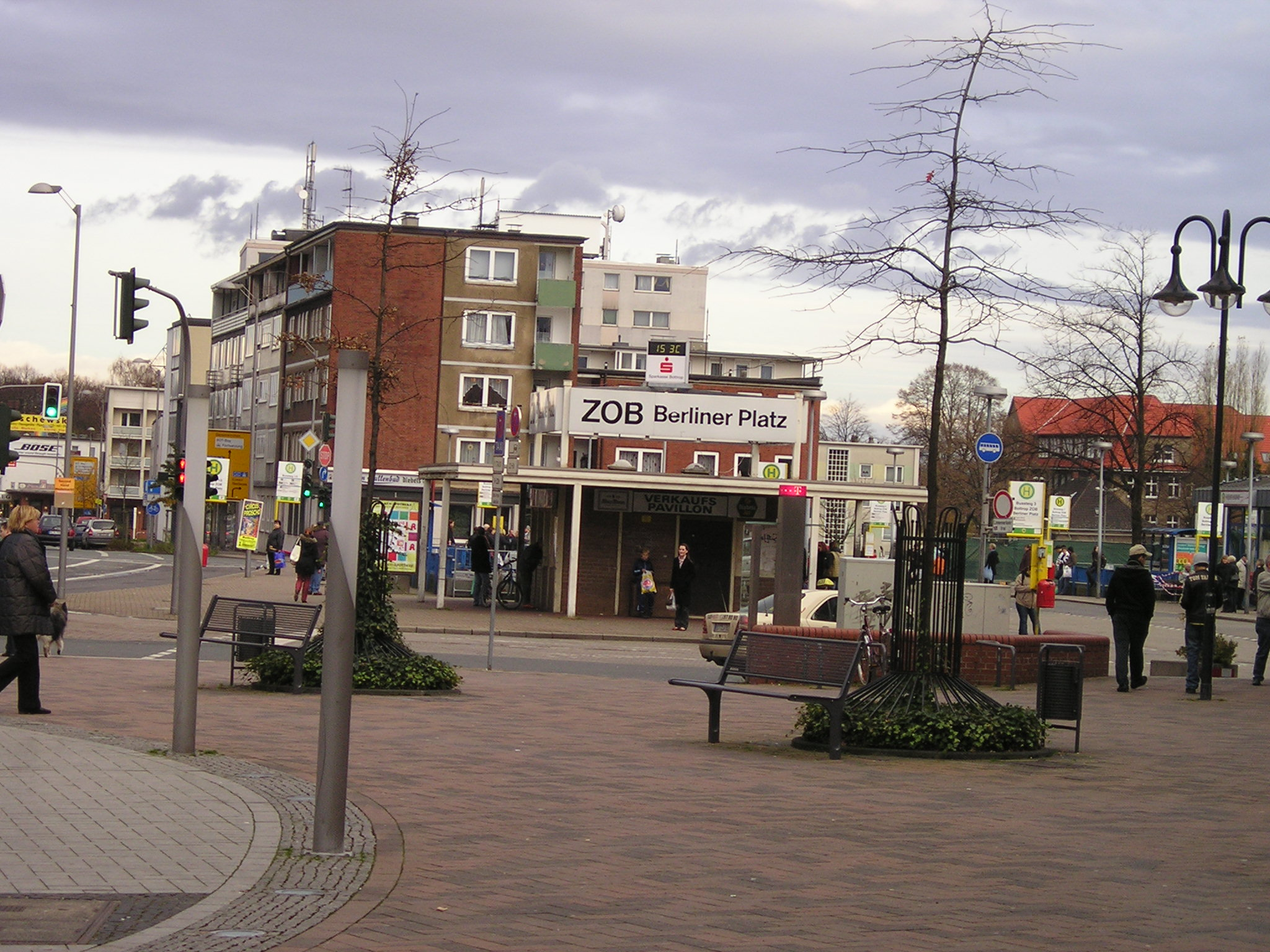 Busbahnhof Bottrop Stand vor Erneuerung!